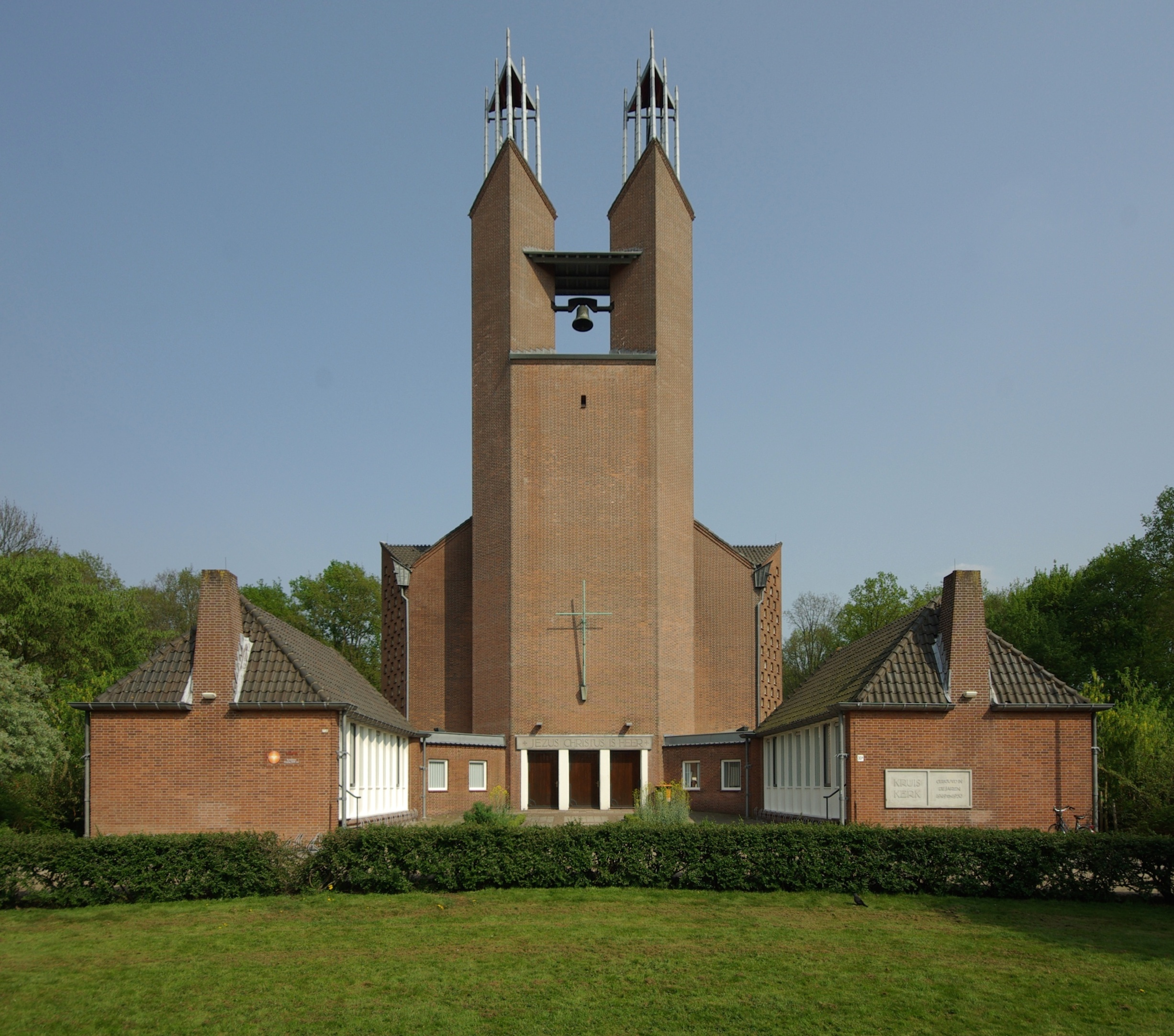 De Kruiskerk in Amstelveen werd door architect Marius Duintjer ontworpen en in 1953 voltooid. De protestantse Nieuwe Kruiskerkgemeente heeft de Kruiskerk als kerkelijk centrum en is gelegen aan de van der Veerelaan. Deze gemeente is ontstaan uit een samengaan van de gereformeerde Pauluskerkgemeente en de hervormde Kruiskerkgemeente. In de Kruiskerk komen nog twee andere gemeenten bijeen, namelijk de Gereja Kristen Indonesia Nederland en de Stadshartkerk. Na voordracht in 2007 via de lijst van rijksmonumenten uit de periode 1940-1958, opgesteld door Ronald Plasterk, werd de Kruiskerk erkend als rijksmonument.